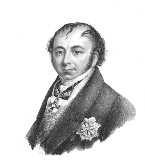 Franciszek Ksawery Drucki-Lubecki